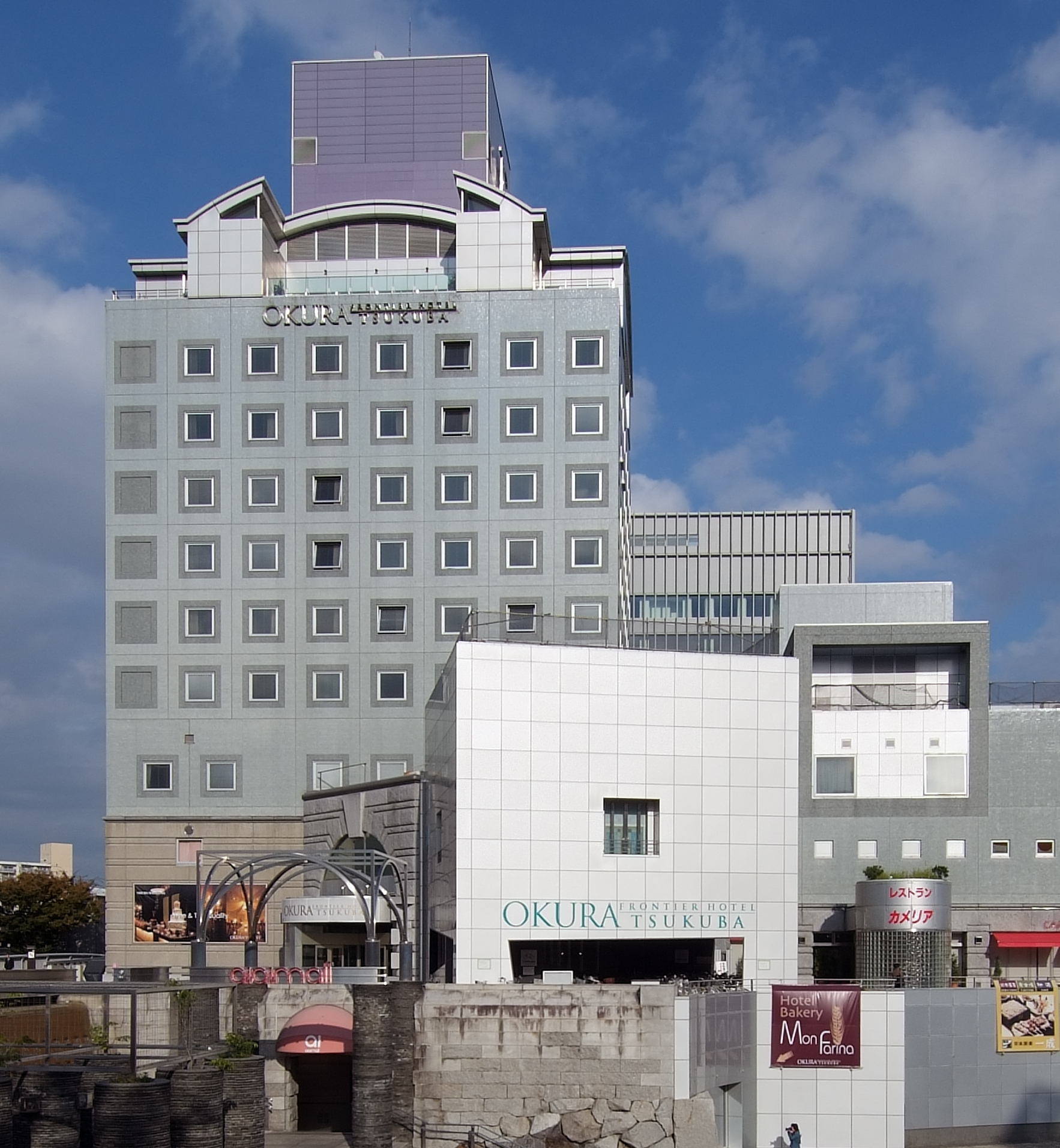 Tsukuba Center Building, at Tsukuba, Ibaraki, Japan, Designed by Arata Isozaki in 1983.